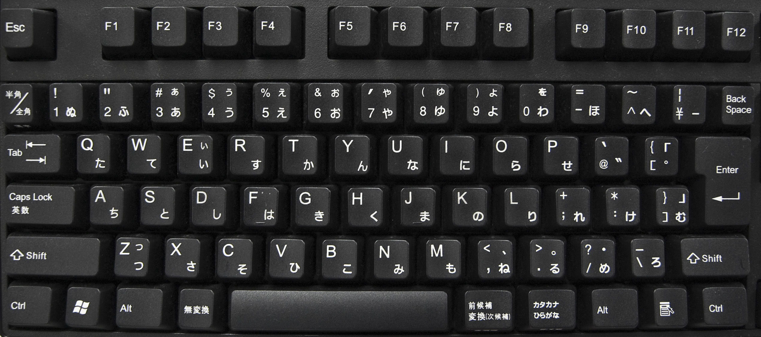 Foto einer japanischen Tastatur